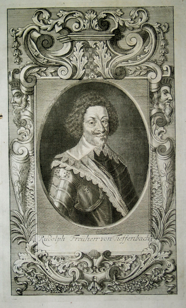 Rudolf von Tiefenbach (1582 - 1653): Rudolph Freuherr von Tieffenbach. Kaiserlich-habsburgischer Feldherr des Dreißigjährigen Krieges.